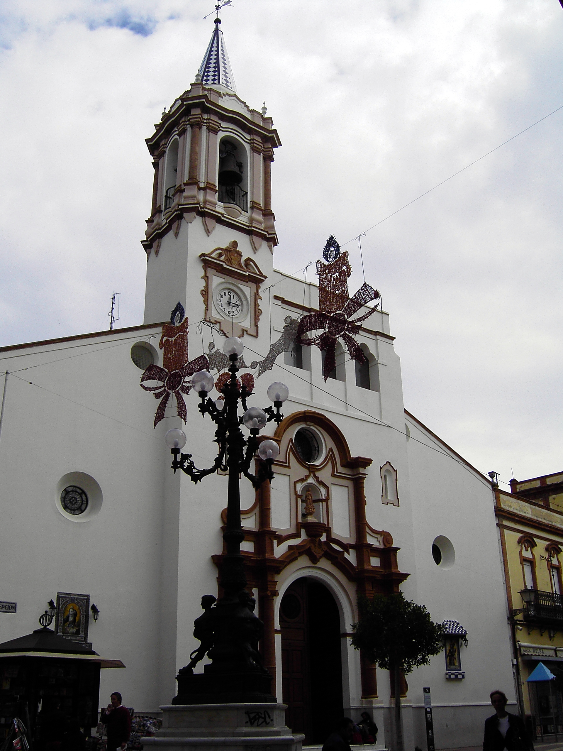 Iglesia parroquial de la Concepción de Huelva (fachada)